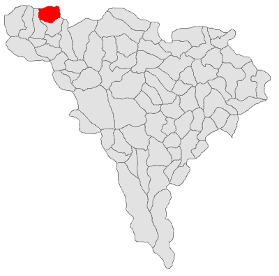 Categorie:Hărţi ale judeţului Alba